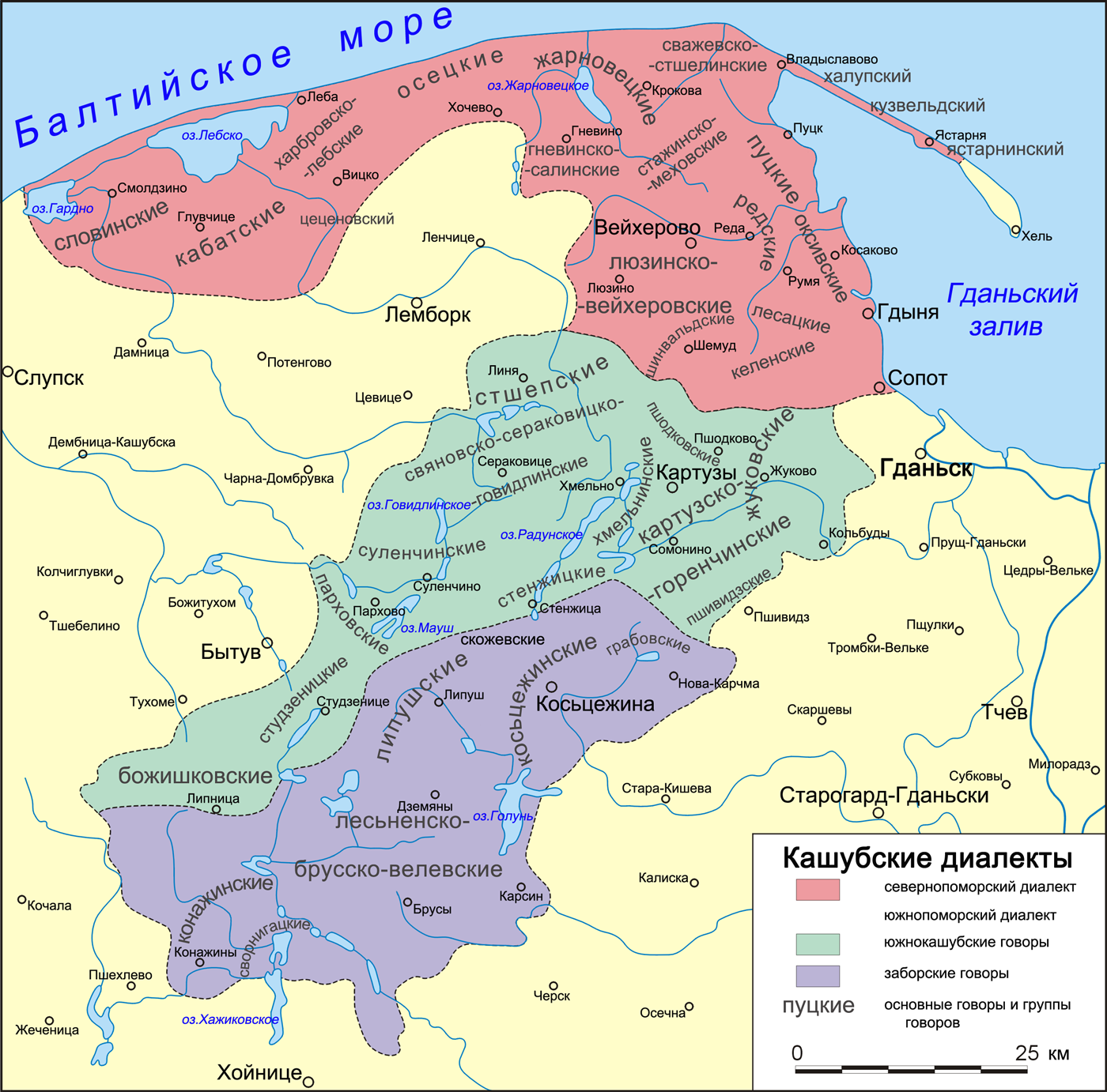 Карта кашубских диалектов, основанная на классификации Фридриха Лоренца (первая половина XX века)